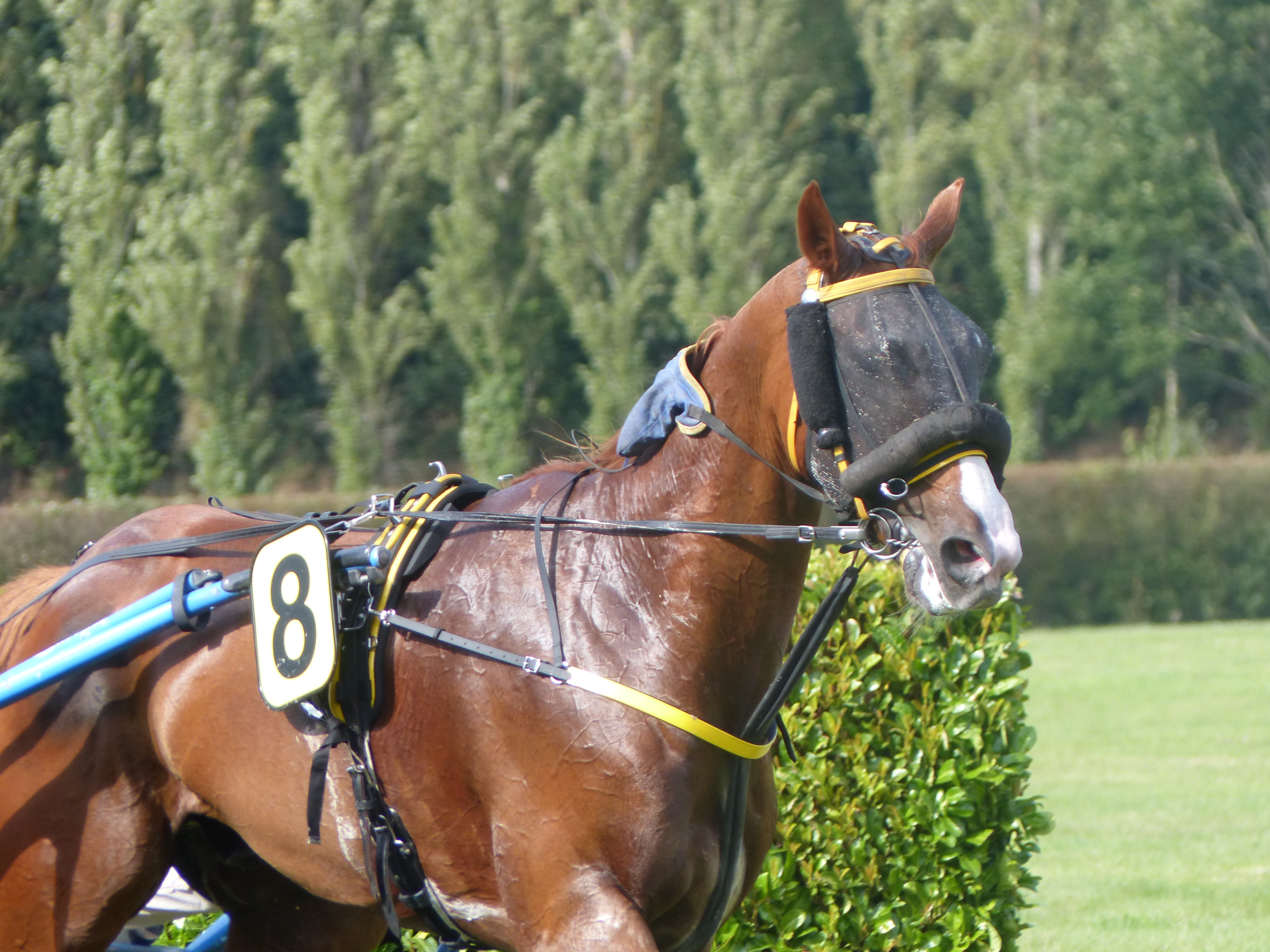 Le hongre Trotteur français alezan Eros d'Omblais, portant un masque anti-mouches et une martingale, à l'hippodrome de Saint-Jean-des-Prés, Guillac, France, 2019.